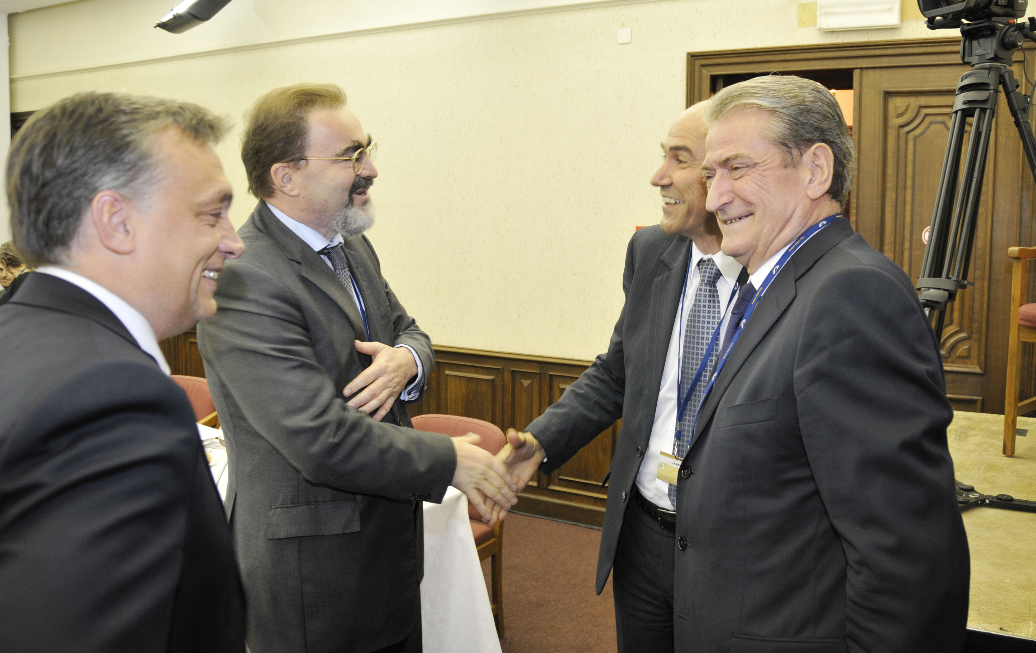 EPP Summit September 2010